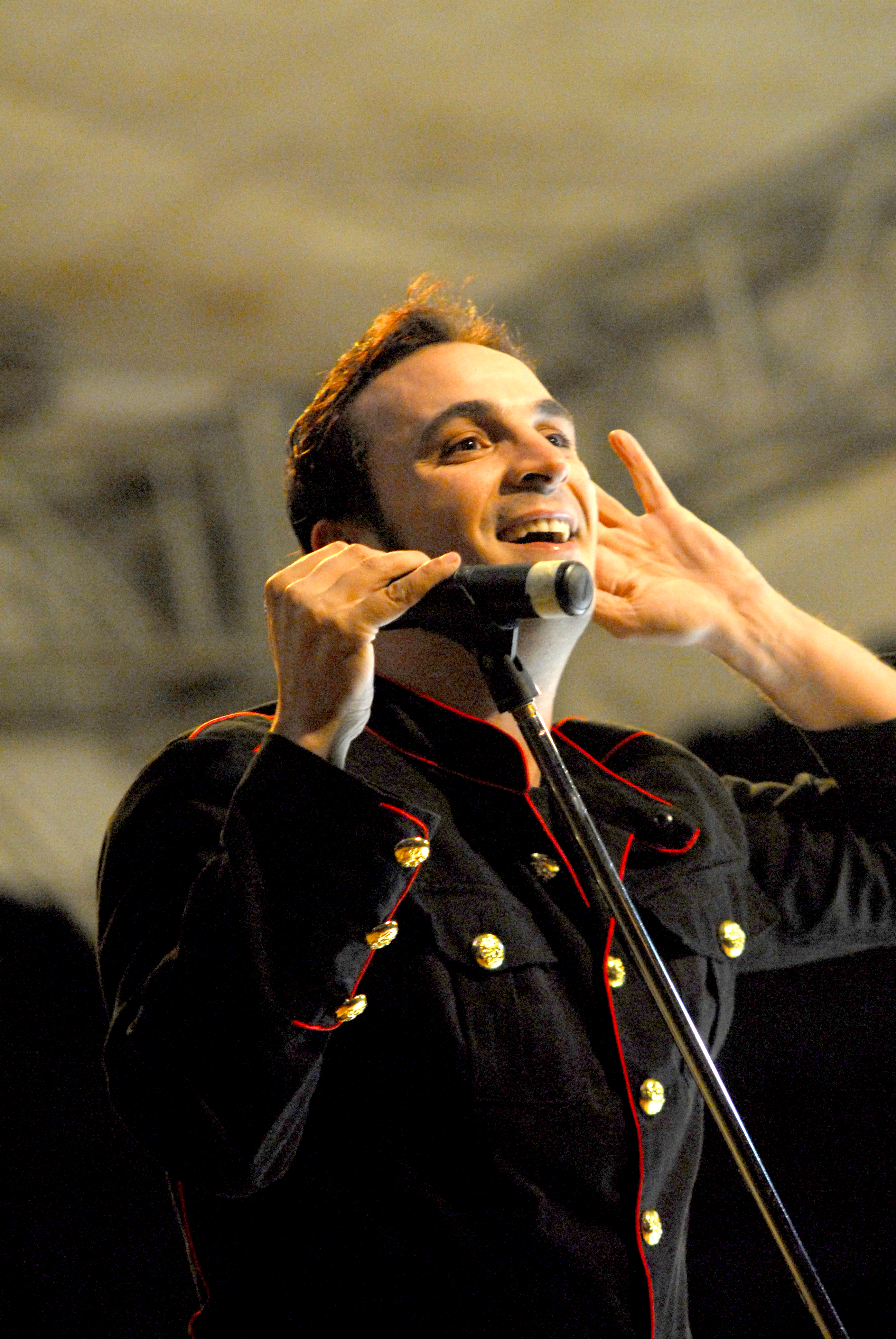 Cristi Enache de la Directia 5 in concert la Brasov, in a 3-a zi de campanie a Umbrelei Verzi.